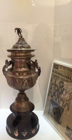 Trofeo obtenido por el «Club Deportivo Guadalajara» el 3 de enero de 1957, tras ganar el campeonato de Primera División temporada 1956-57. El trofeo se encuentra en la exhibición permanente del museo ubicado en el interior del Estadio Chivas.